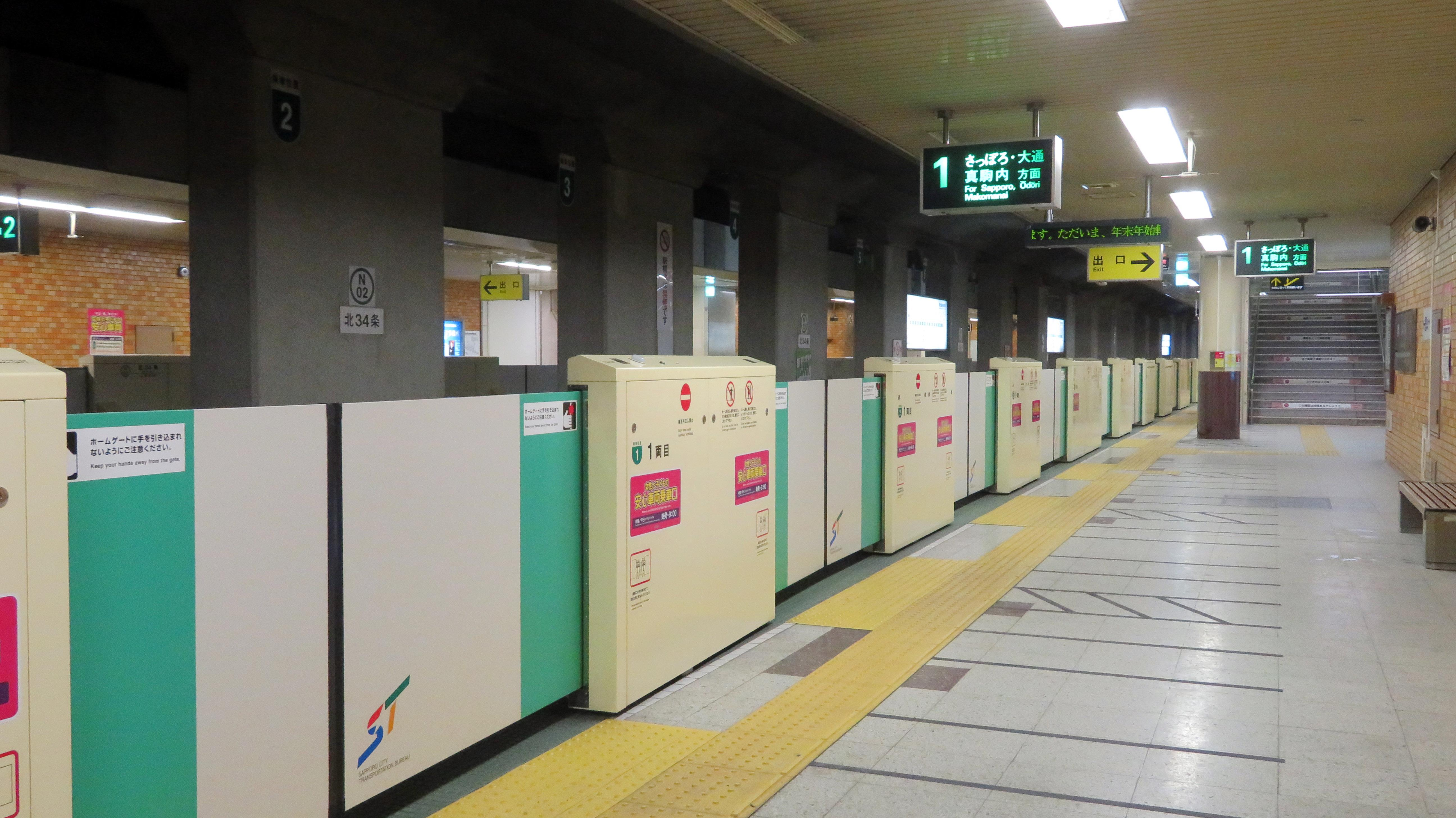 北34条駅ホーム Canon PowerShot SX720 HS